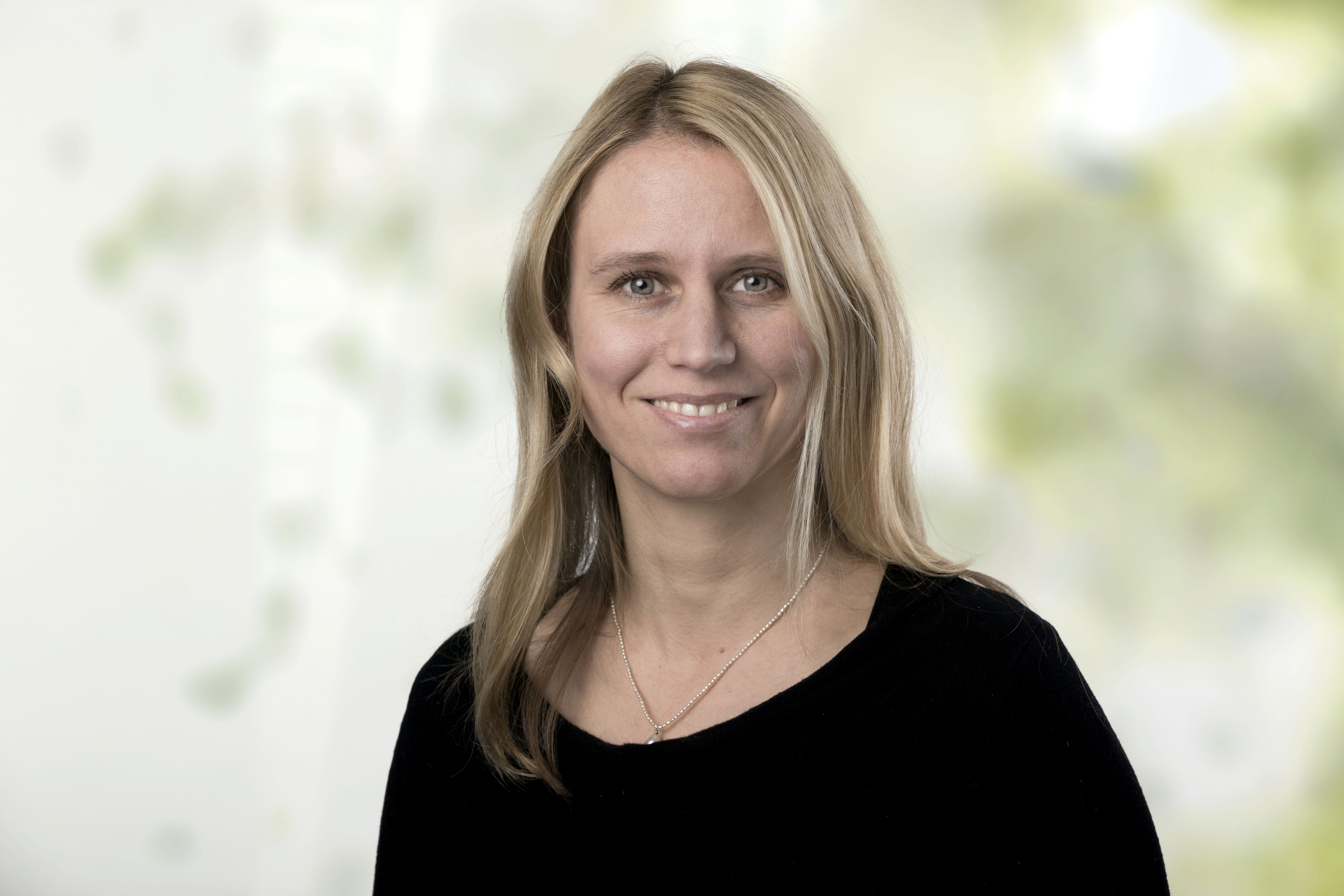 Maaret Westphely, 2015, taken by Sven Brauers